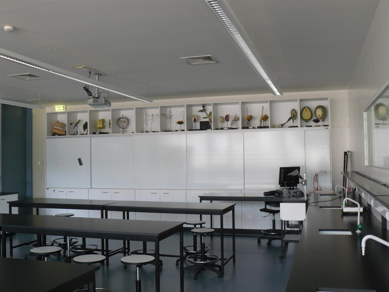 Interior de uma sala de aulas da Escola Secundária Pedro Nunes.